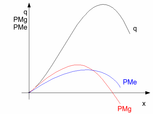 Gráfico típico das funções de produção (q), produtividade média (PMe) e produtividade marginal (PMg).